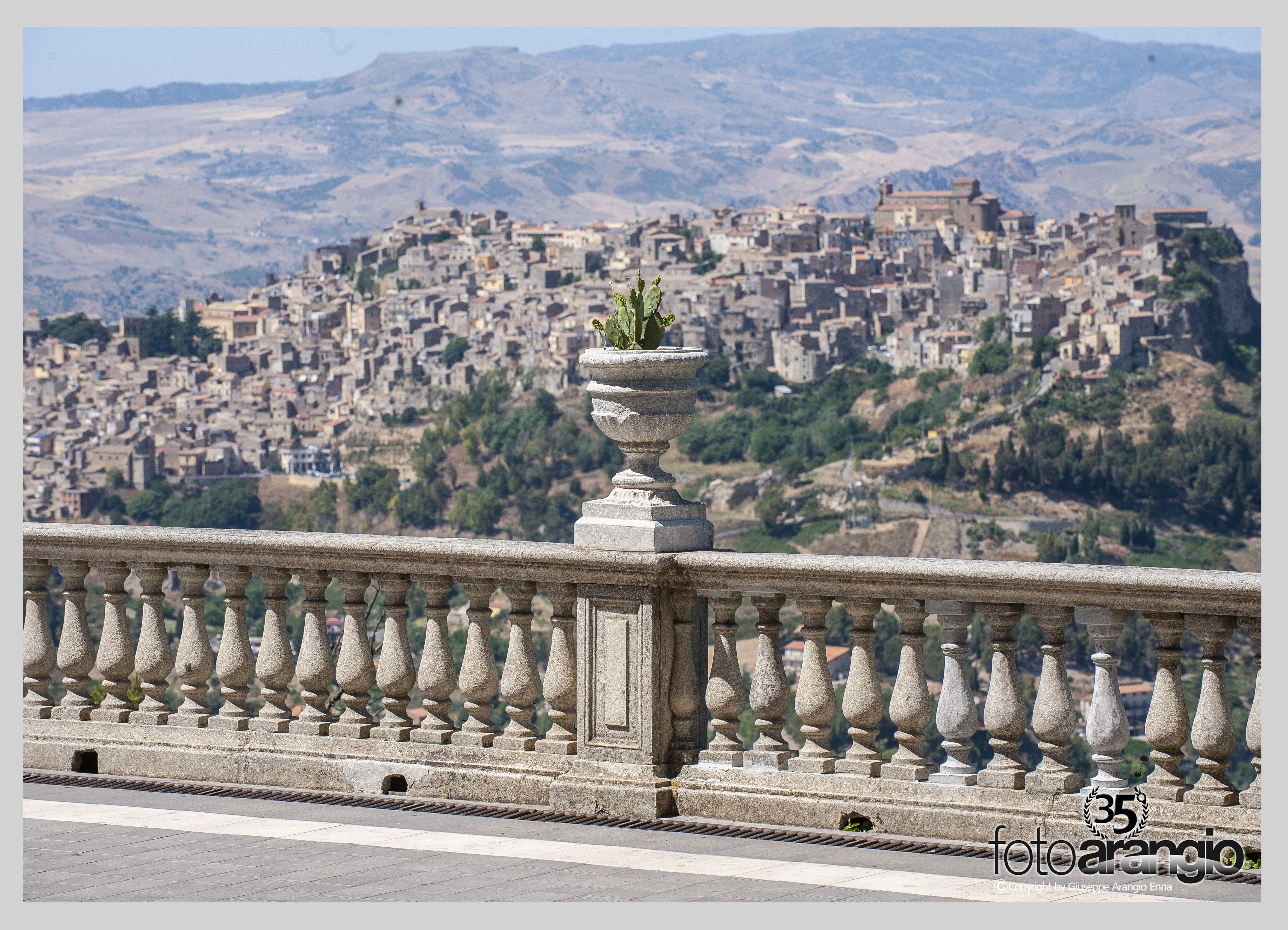 Veduta dal Belvedere di Enna il piccolo paese di Calascibetta